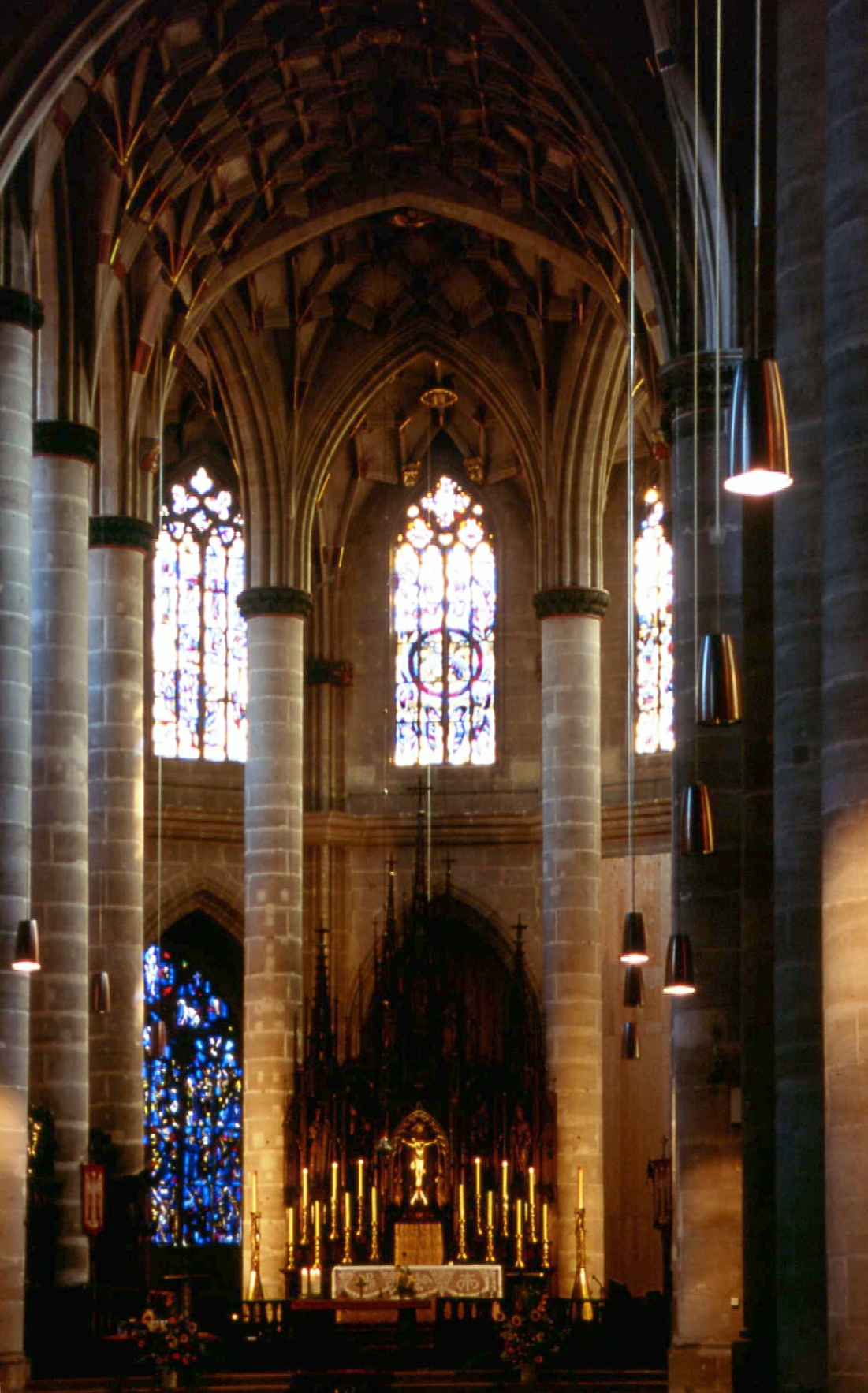 Schwäbisch-Gmünd, Heilig-Kreuz-Münster. Blick in den Chor mit spätgotischem Netzgewölbe.